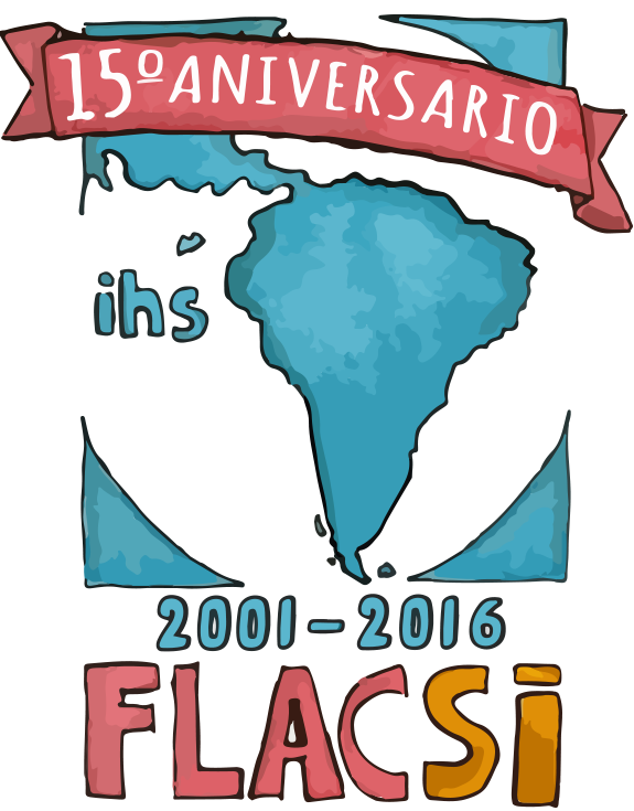 Imagen especial aniversario